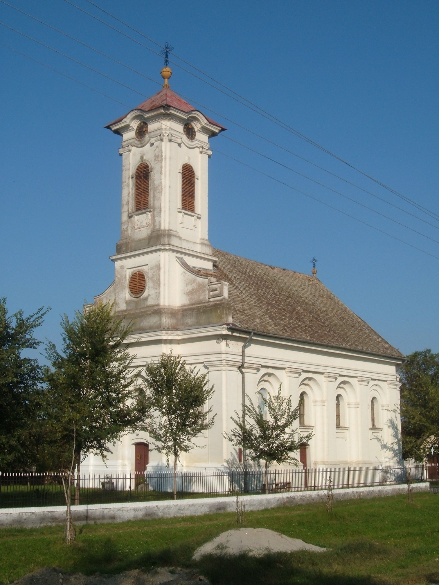 Pravoslavna crkva u Loku